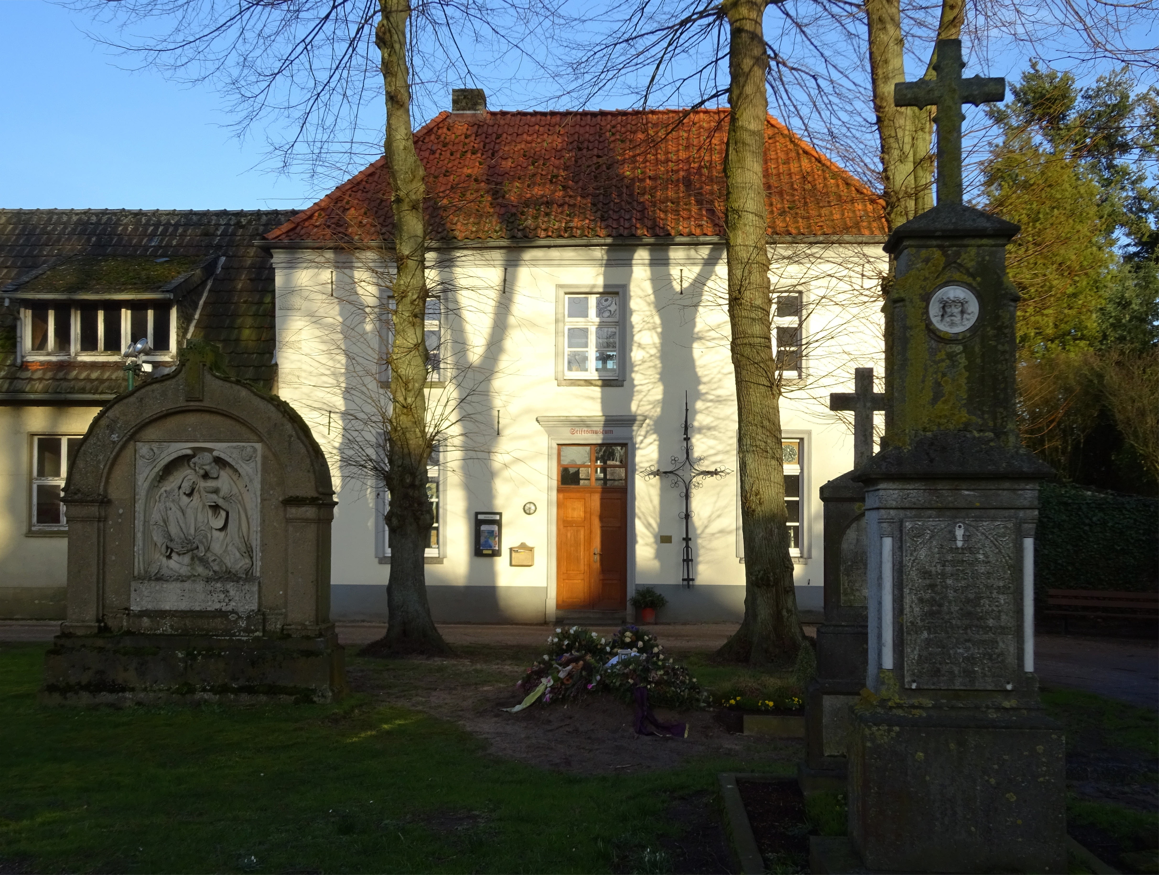 Kalkar-Wissel, Stiftsmuseum aan de Köstersdick 22